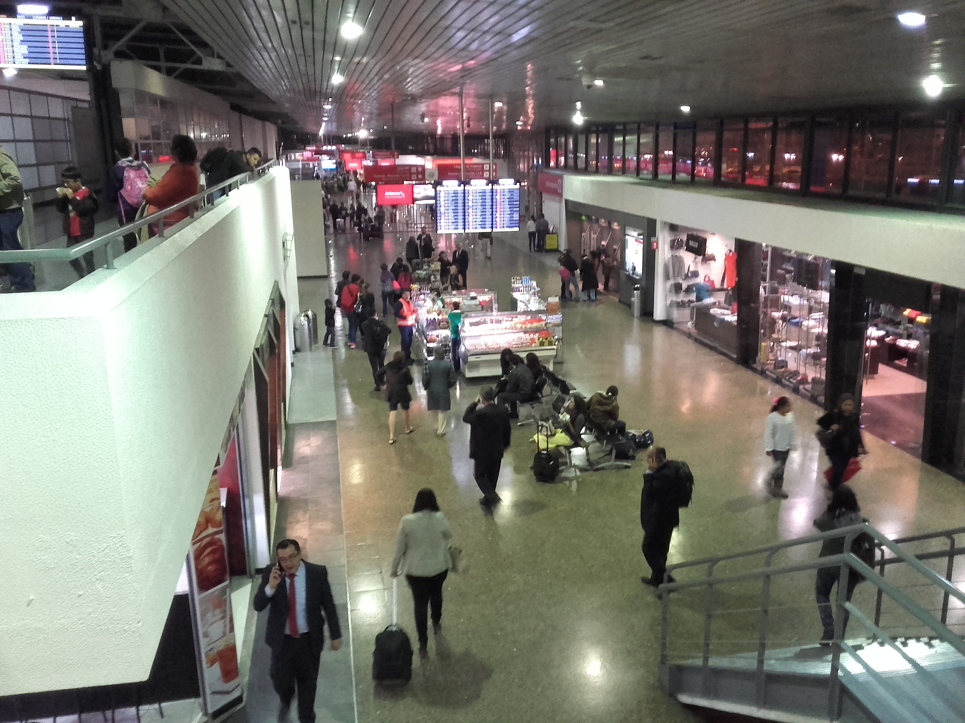 terminakessss